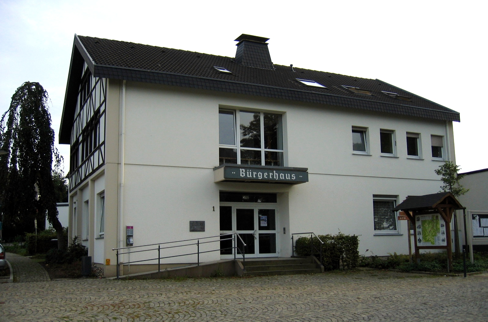 Bürgerhaus im Ortsteil Wiblingwerde der Gemeinde Nachrodt-Wiblingwerde.